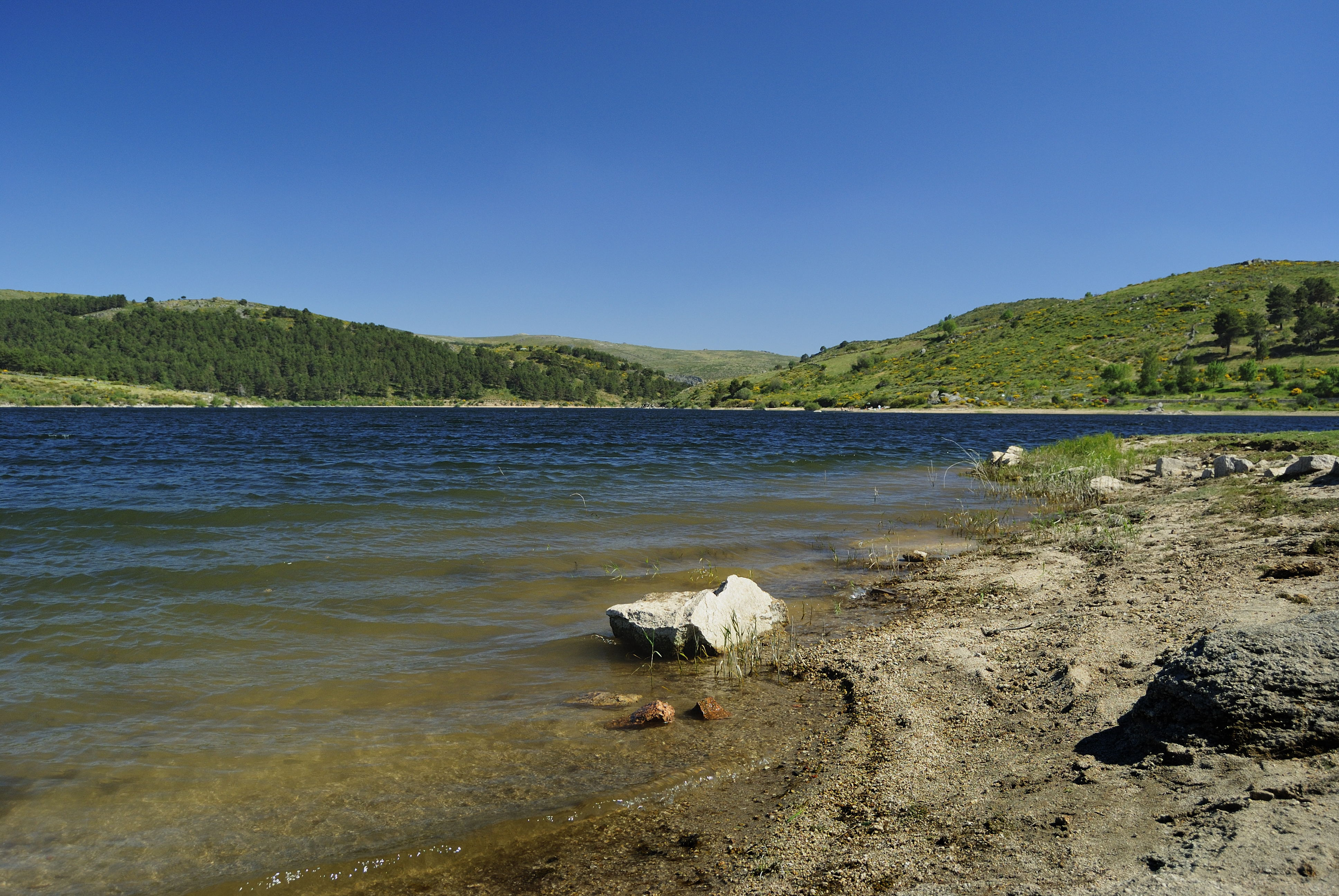 Campo Azalvaro - Pinares Peguerinos - Embalse de la Aceña This is a photography of a Special Area of Conservation in Spain with the ID: ES4110097. Natura2000 entry, EEA entry